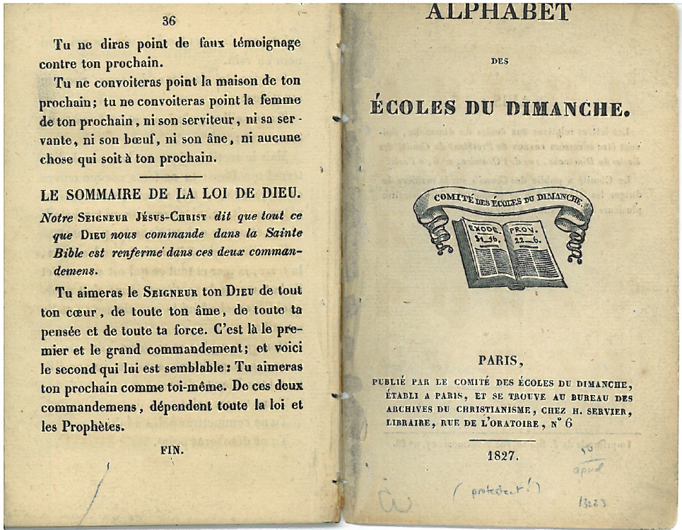 Couverture de premier Alphabet des Écoles du dimanche, publié en 1827, par le Comité d'encouragement des Écoles du dimanche, à Paris.